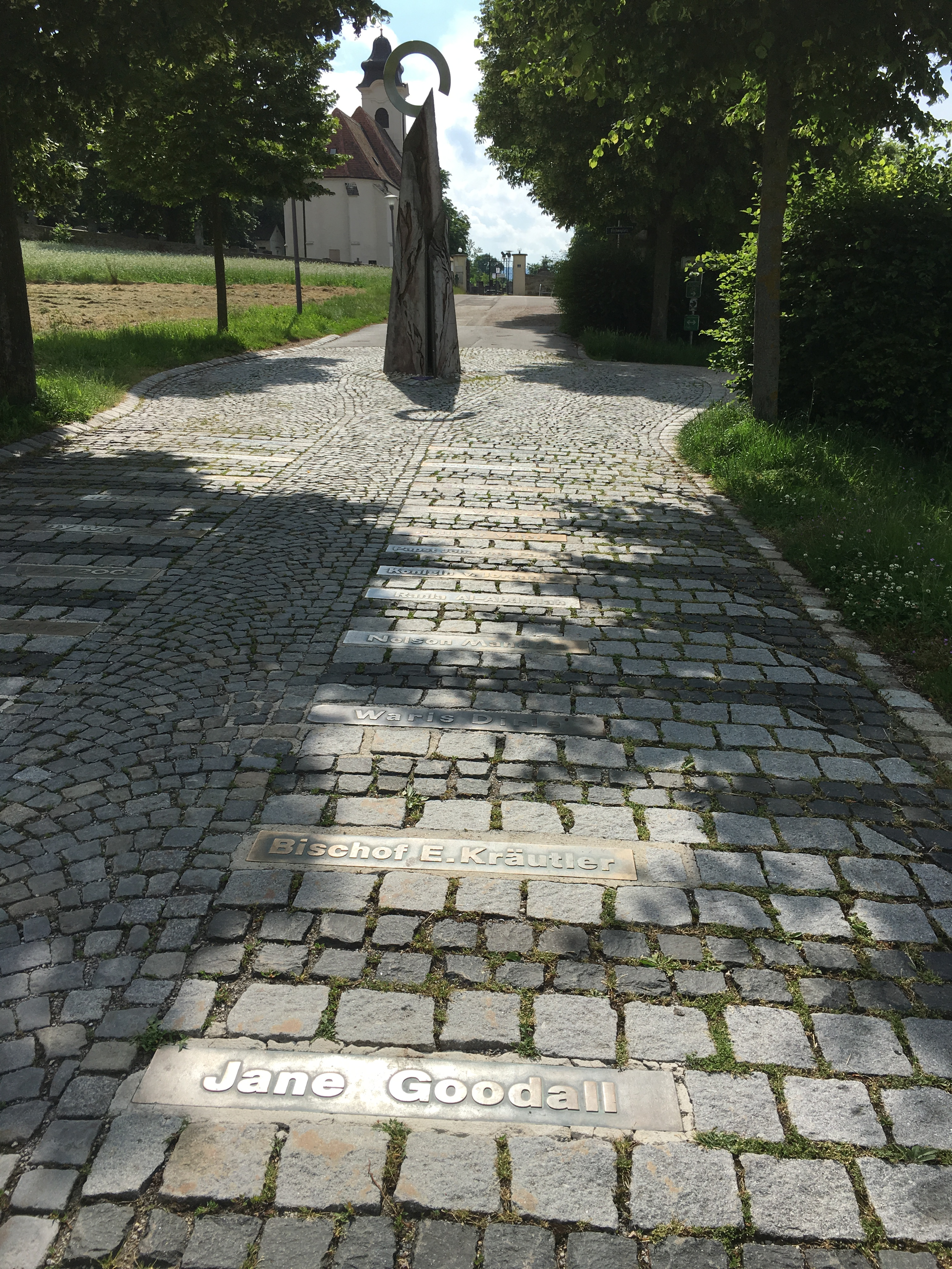 Skulptur des May-Way-Skulpturenwegs in Hagenbrunn.